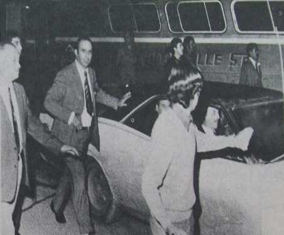 El general Roberto Requeijo llega a un local de su partido, el Partido Provincial Rionegrino, en la ciudad de General Roca, Río Negro, durante un intento de incendiarlo.